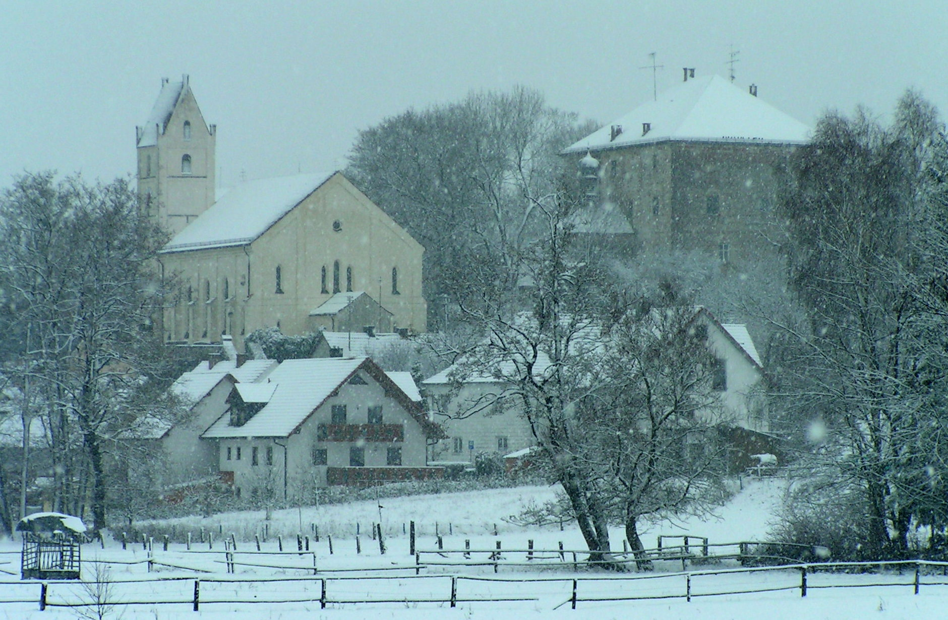 Jetzendorf: Castle i church